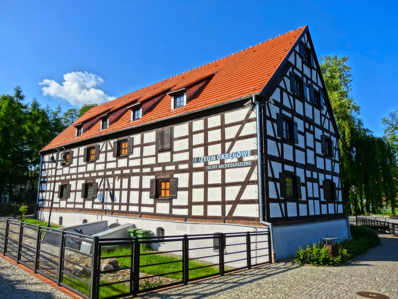 Biały Spichlerz na Wyspie Młyńskiej w Bydgoszczy, zbud. ok. 1790 r. na gotyckich piwnicach z XV-XVI w.